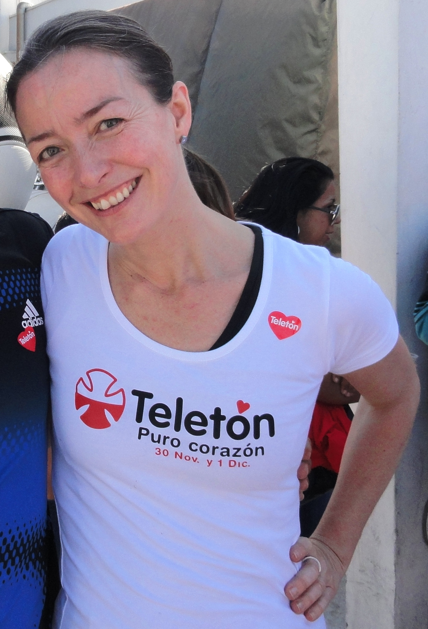 María Consuelo Saavedra Flórez (20 de abril de 1970), periodista chilena durante un partido de futbol en ayuda a la Teletón 2012.